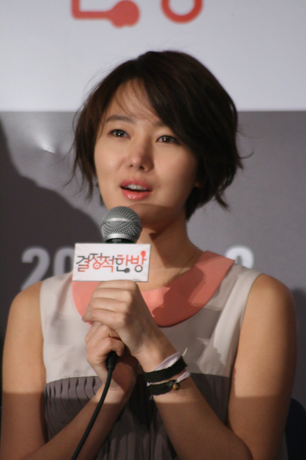 2011년 12월 1일 서울 왕십리 CGV에서 열린 영화 《결정적 한방》 언론시사회 및 기자간담회에 참석한 윤진서.